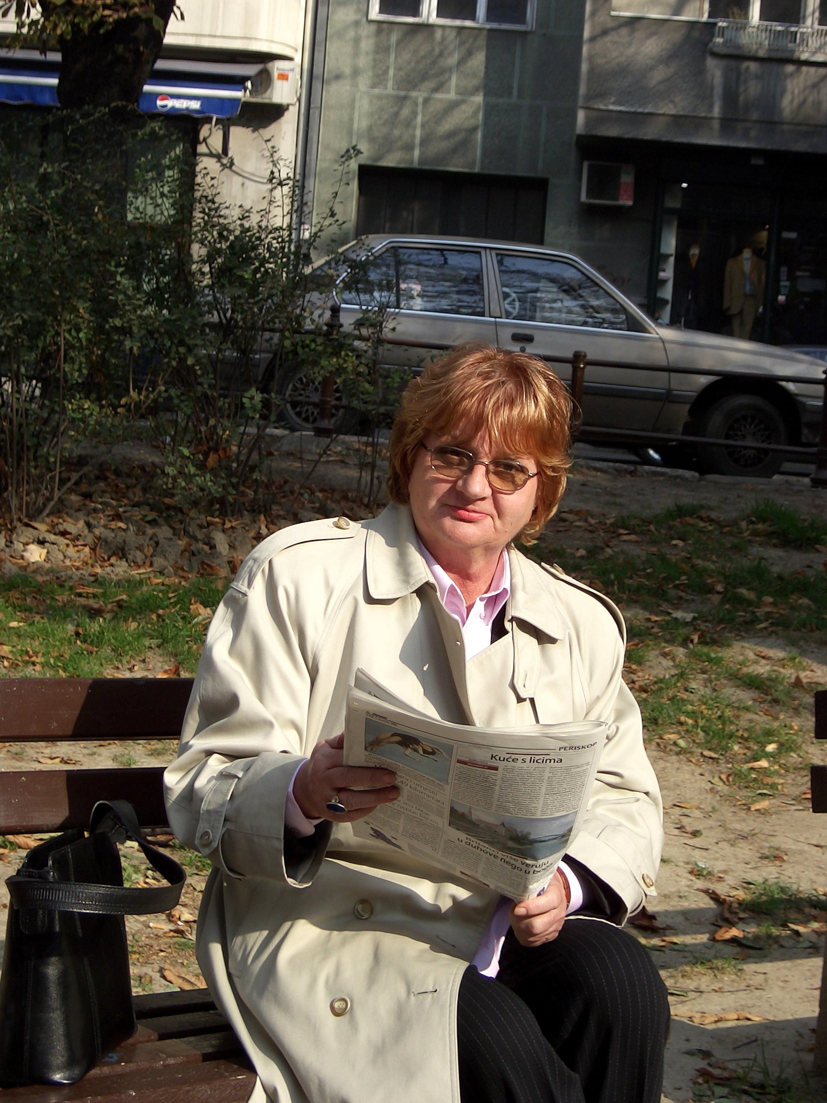 Mirjana Stefanović, Serbian writer